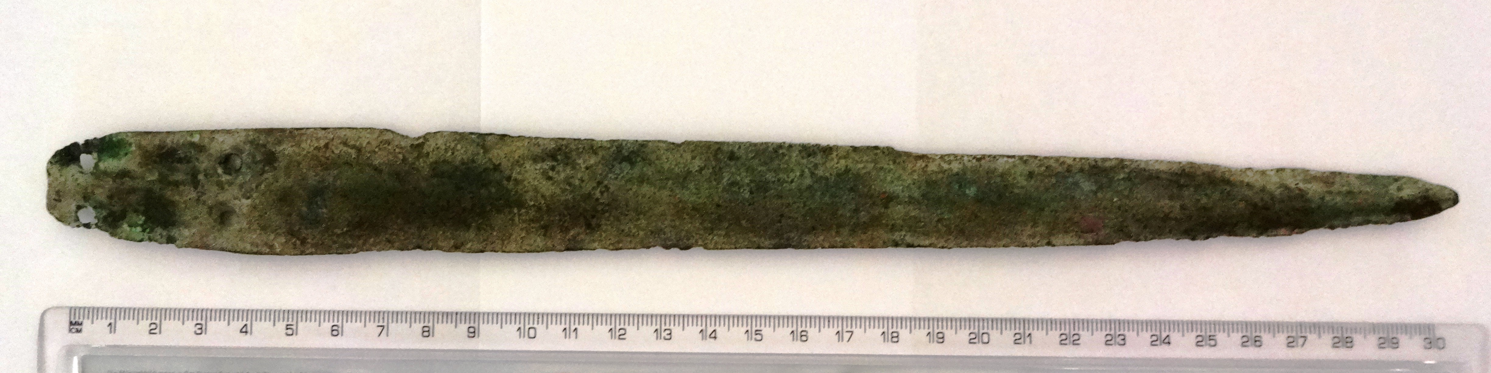 Lanzenspitze mit vier Ösen für Nieten zur Schäftung, vermutlich Bronze- oder Eisenzeit